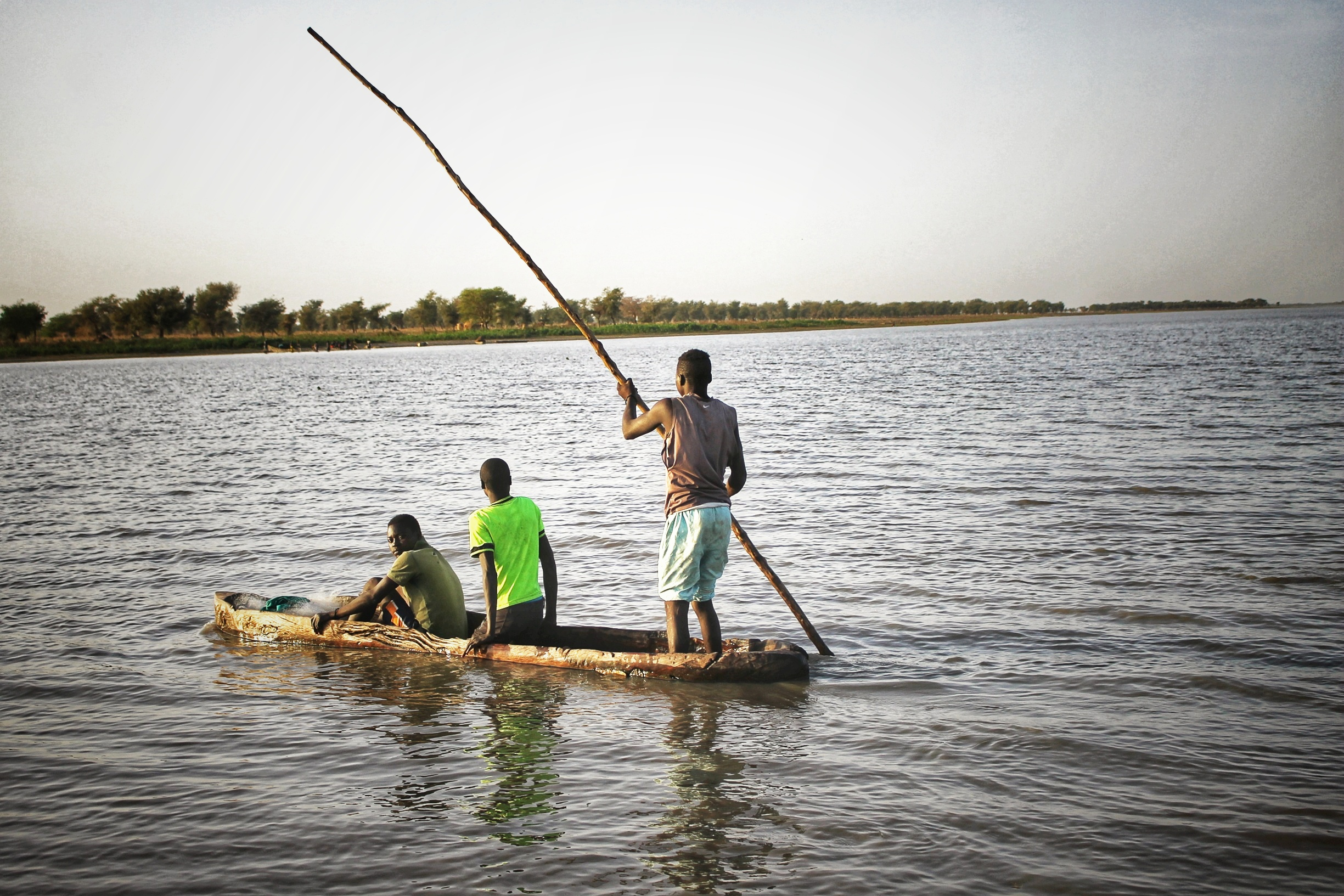 Les pêcheurs dans le lac de Guere situé dans le département du Mayo Danay à l'Extrême nord du Cameroun This is an image with the theme "Africa on the Move or Transport" from: Cameroon